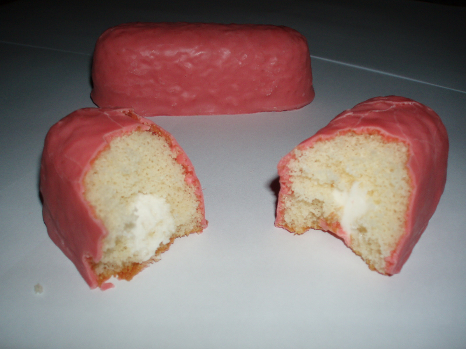 Un bollo "Pantera Rosa", comercializado por el Grupo Bimbo.